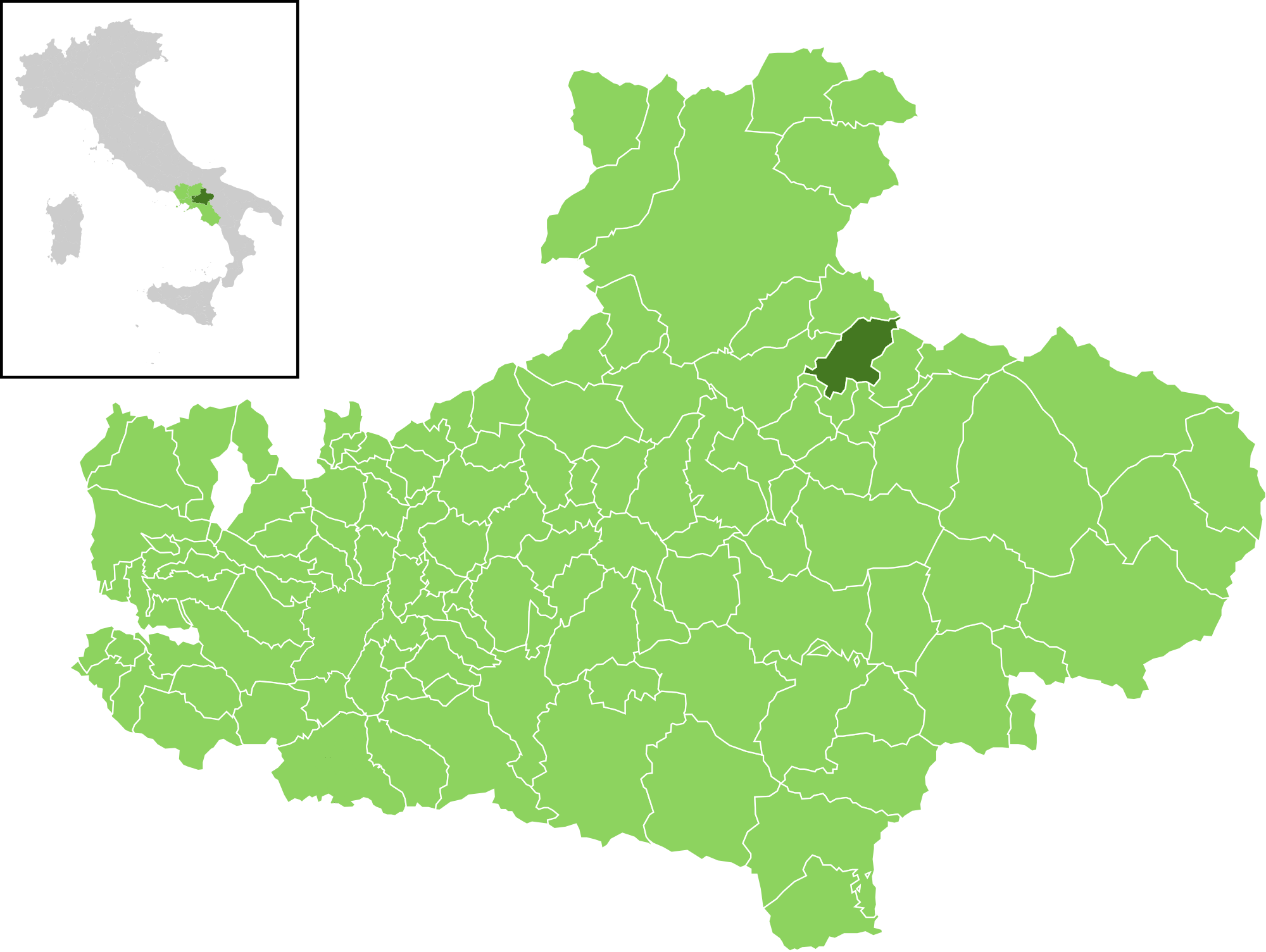 Posizione del comune all'interno della provincia di Avellino